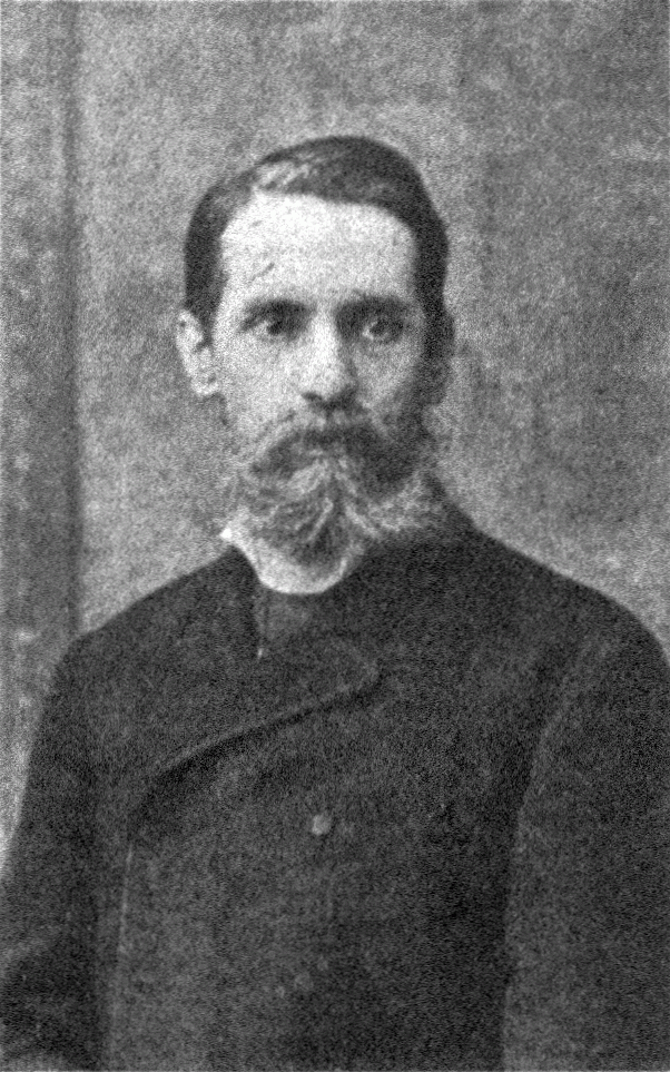 Felix Freiherr Pino von Friedenthal (1825-1906), Austrian politician